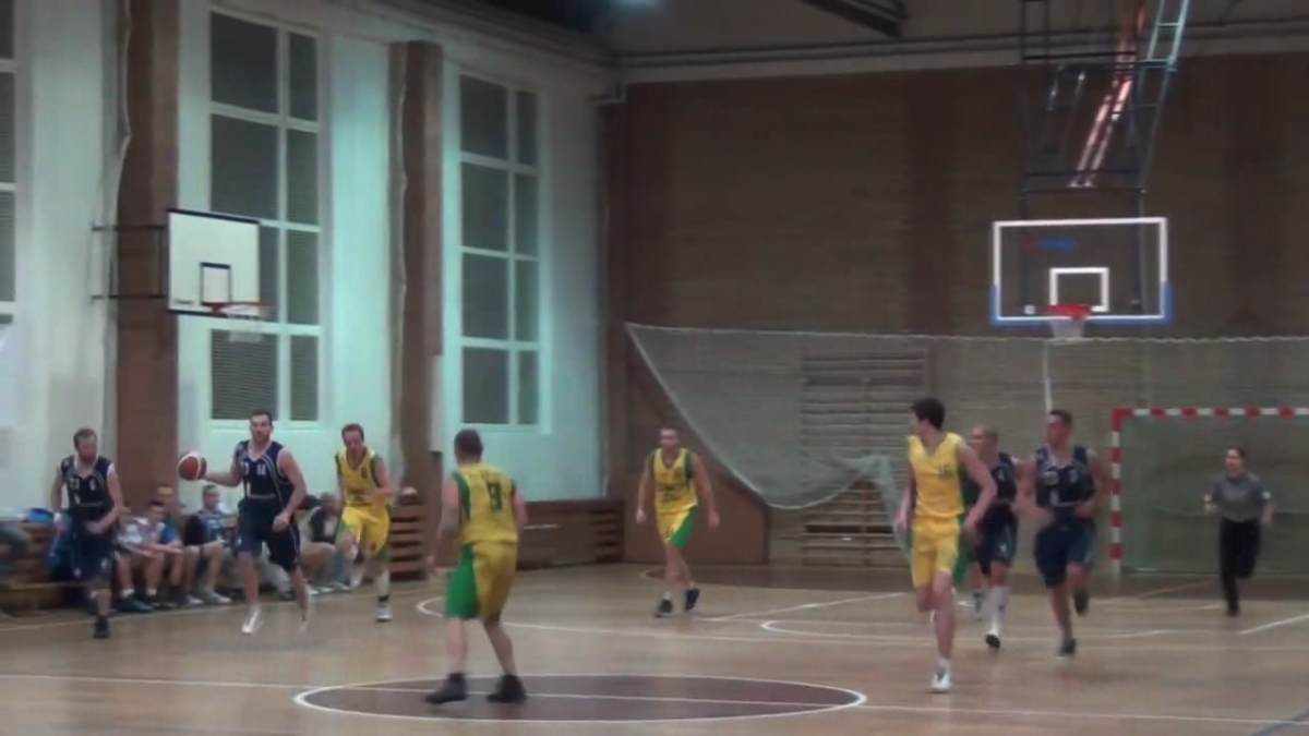 Intermarche Basket Cup 2012/2013, mecz PGKiM Ozimek (III liga) z Pogonią Prudnik (II liga) rozegrany 17 października 2012 ([1]). Mecz zakończył się wygraną Pogoni (wynik 62:113)